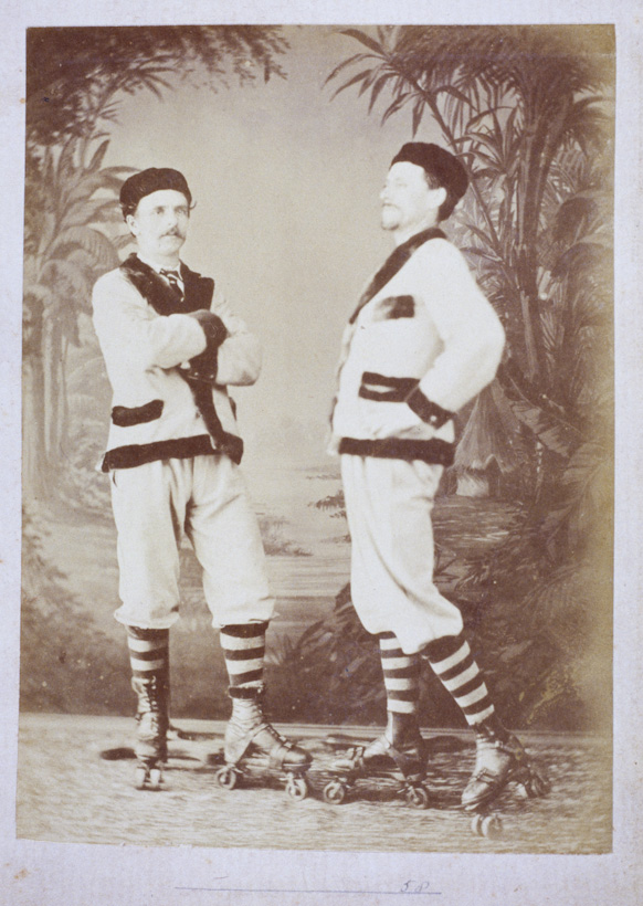 Obra que integra o acervo do Museu Paulista da USP. Coleção Militão Augusto de Azevedo.